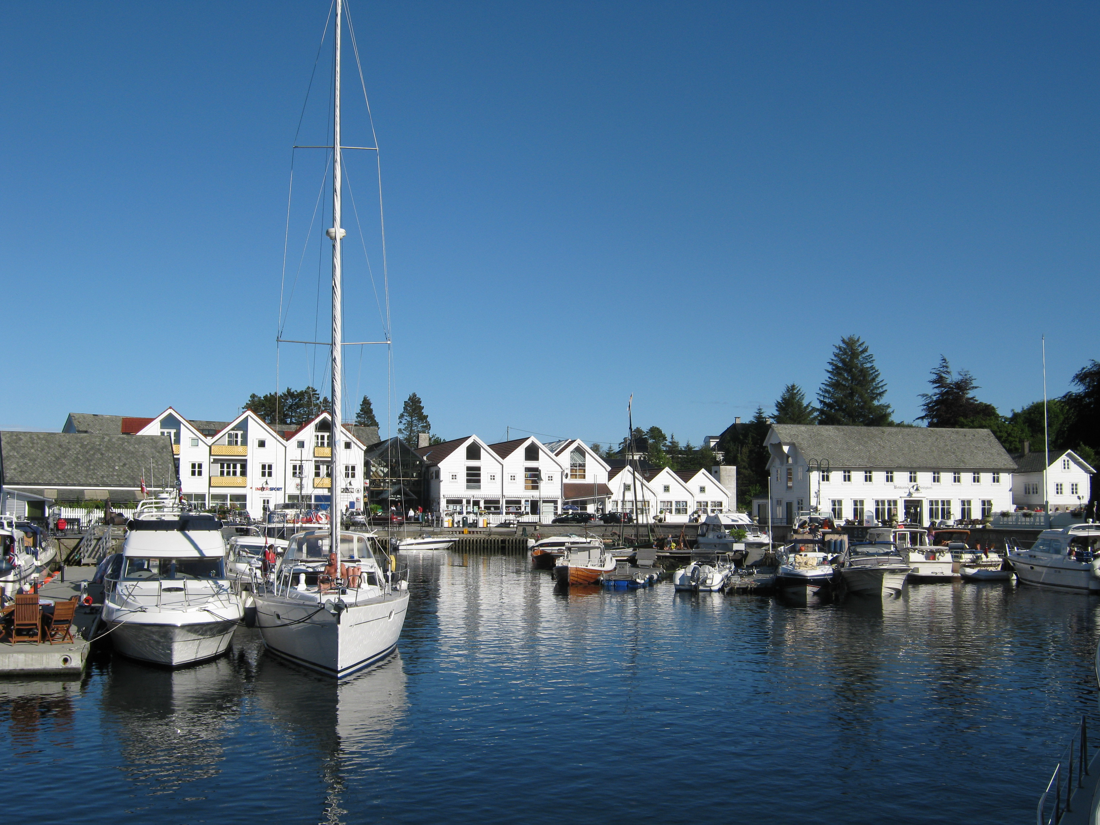 Havnen på Bekkjarvik, Austevoll